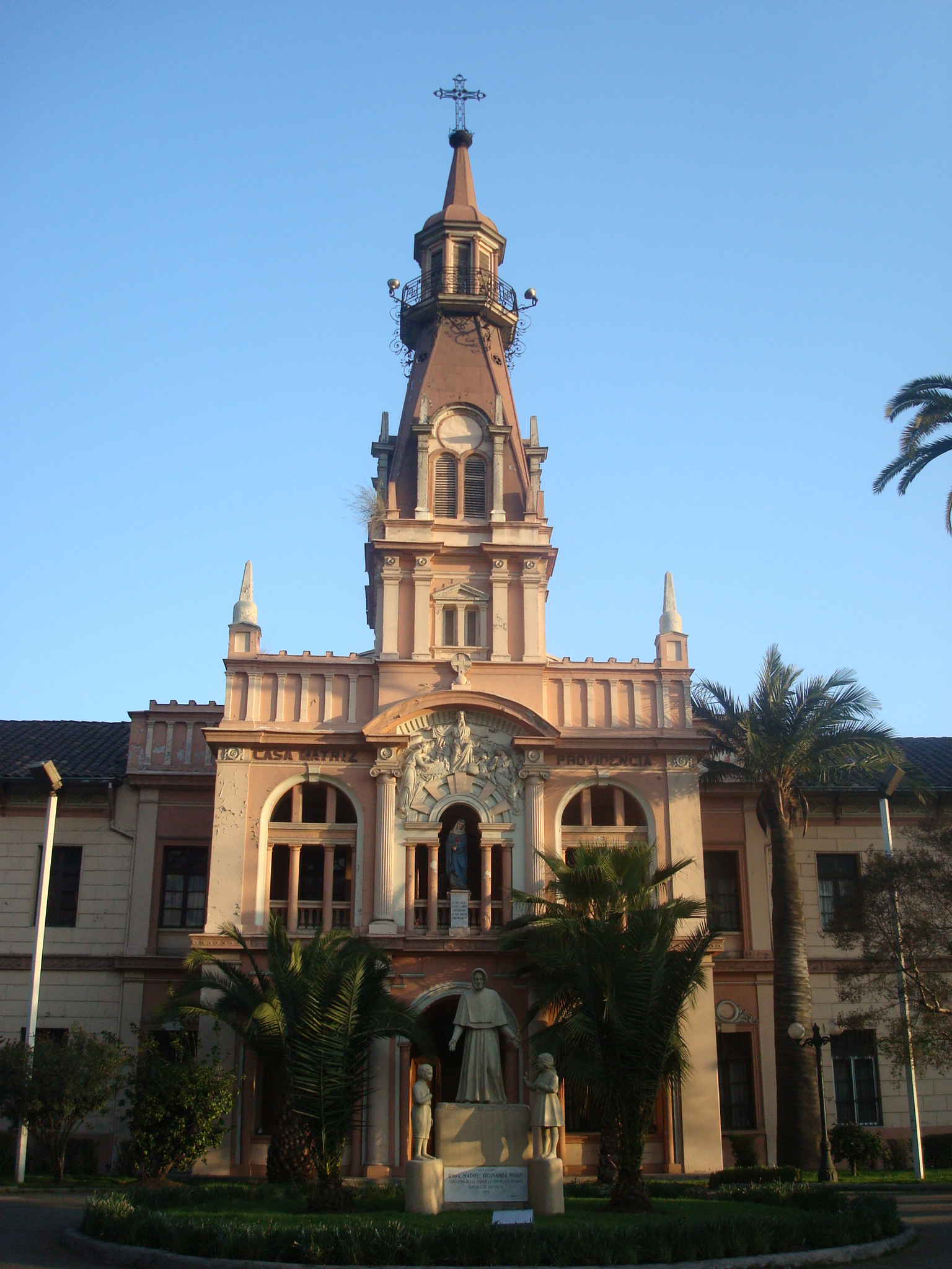 Casa Matriz de la Providencia, Providencia, Santiago, Chile